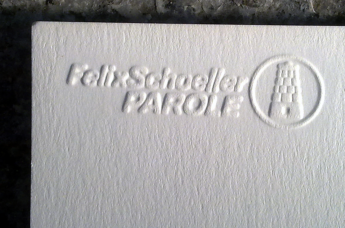 Blindstempel auf hochwertigem, mehrfach geleimtem Zeichenkarton (um 1998)